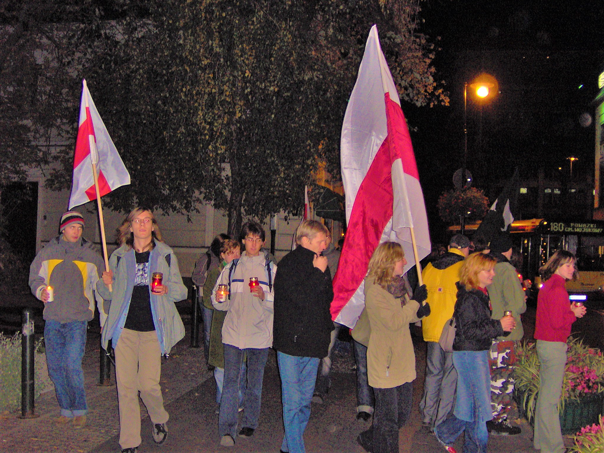 Dzień Solidarności z Białorusią - Warszawa, październik 2005